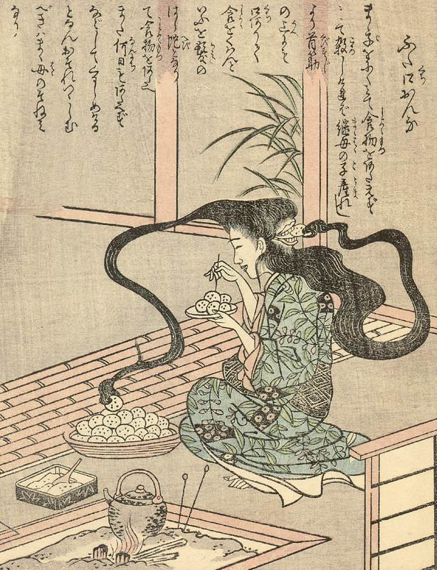 Futakuchi-onna (二口女) from the Ehon Hyaku Monogatari (絵本百物語)